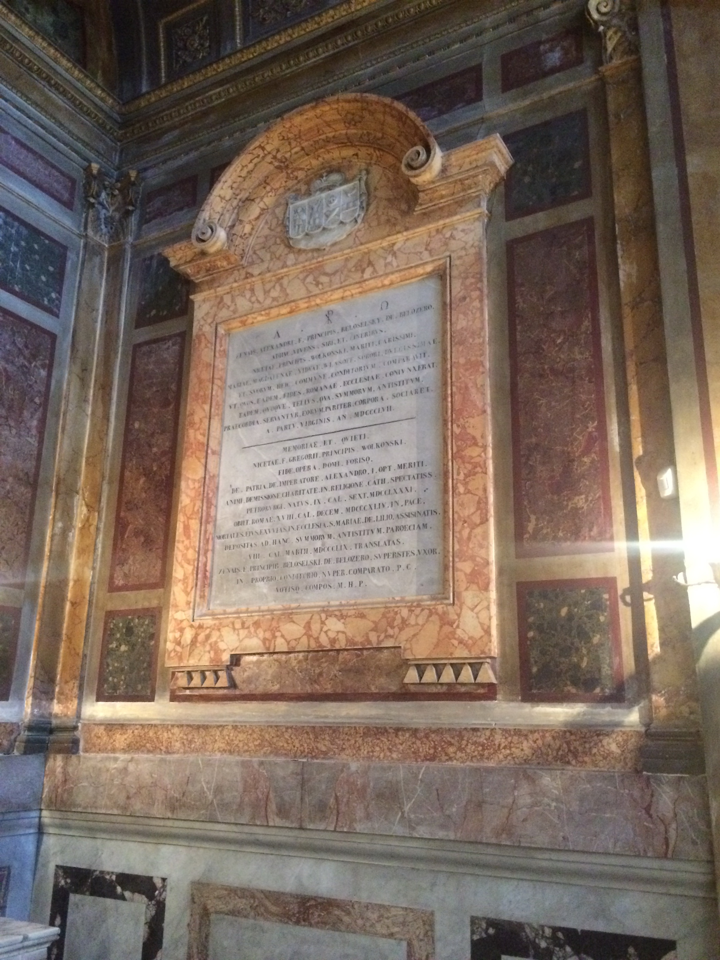 Надгробие Зинаиды Волконской